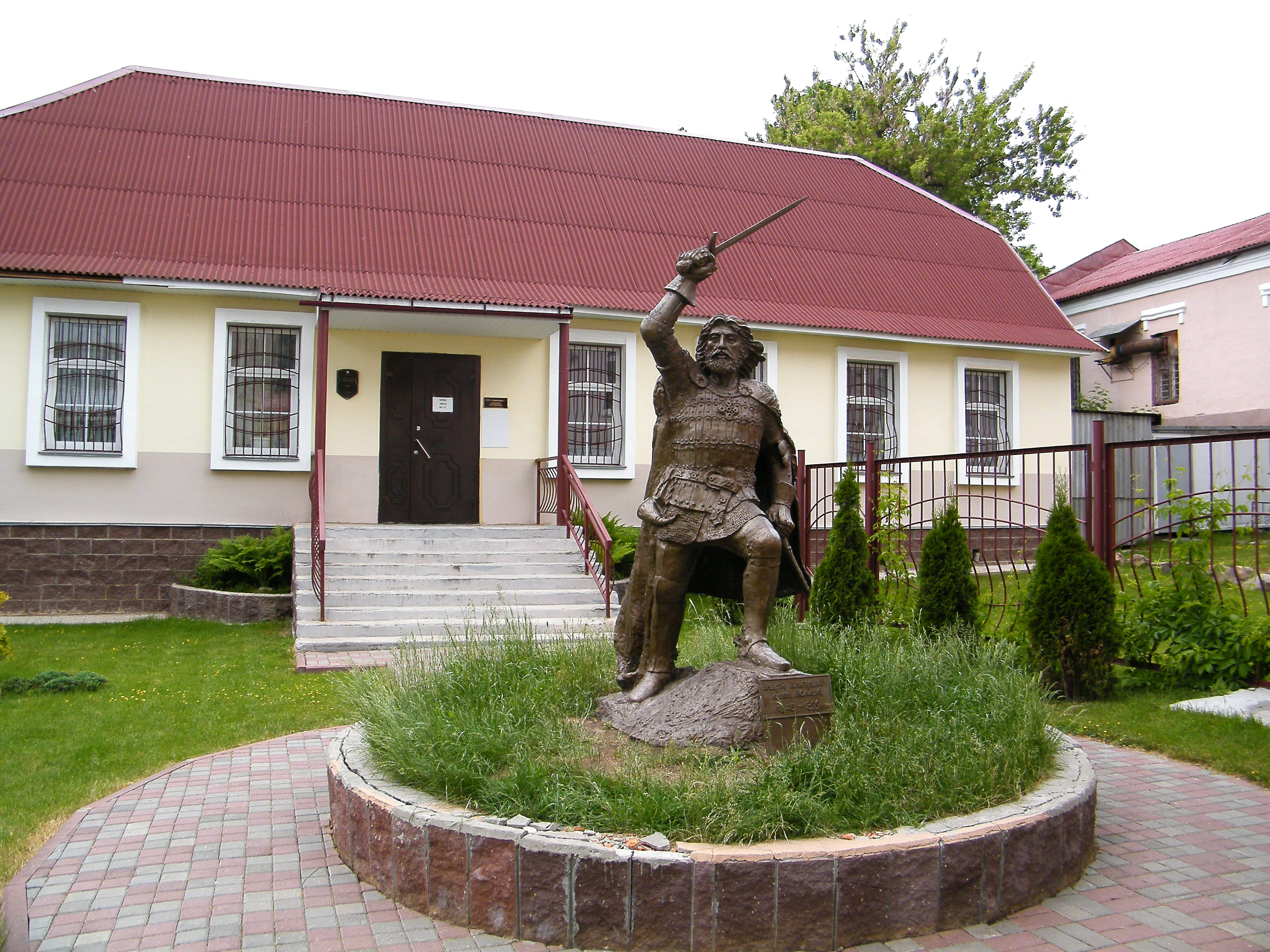 Памятник Андрею Полоцкому